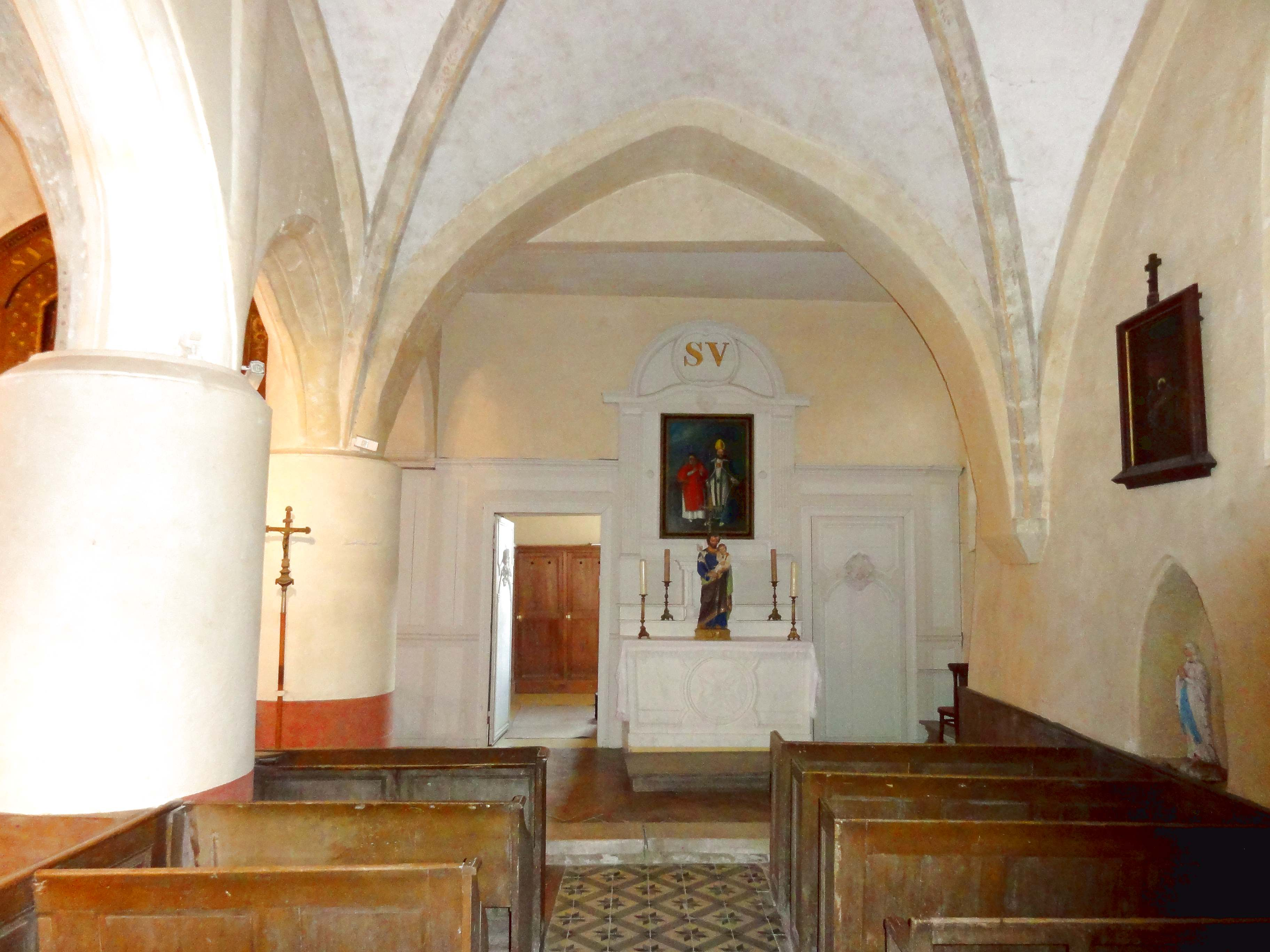 Intérieur de l'église - voir titre.